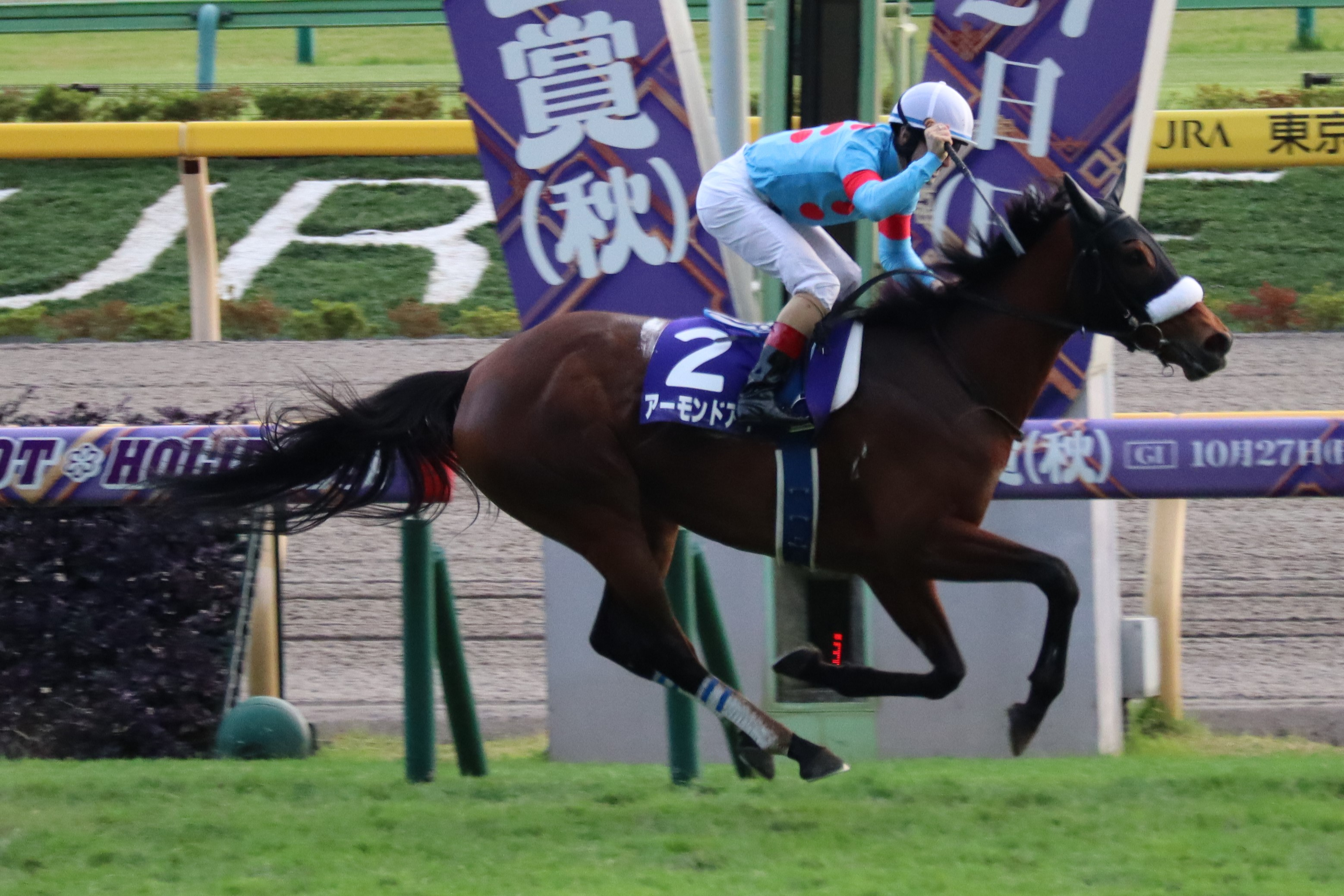 第160回天皇賞(秋)ゴール前